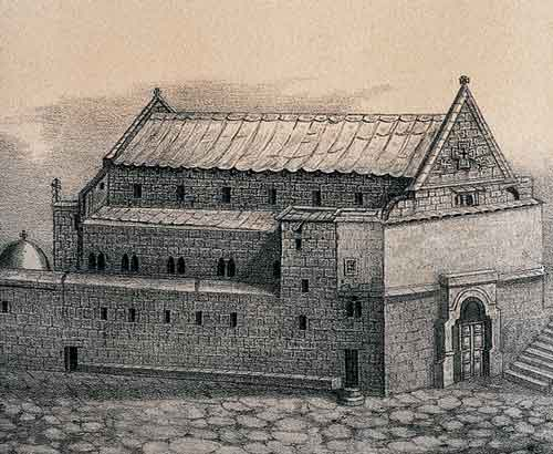 Basilica of the Transfiguration, Saint Catherine's Monastery, Mount Sinai (Литография рисунка базилики Преображения (Синай) из из альбома архимандрита Порфирия Успенского)